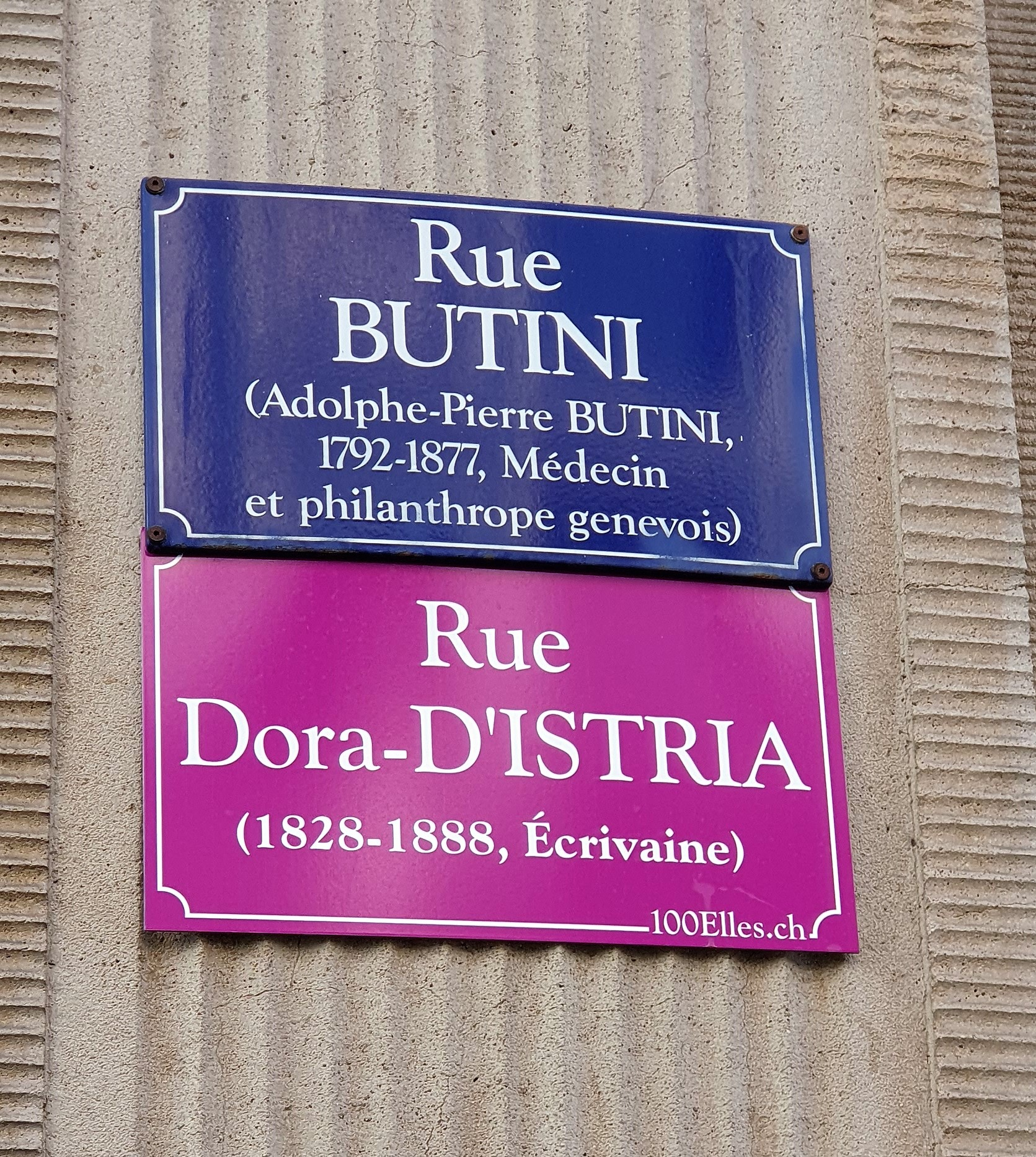 Plaque temporaire de rue apposée dans le cadre du projet 100elles à Genève en 2019